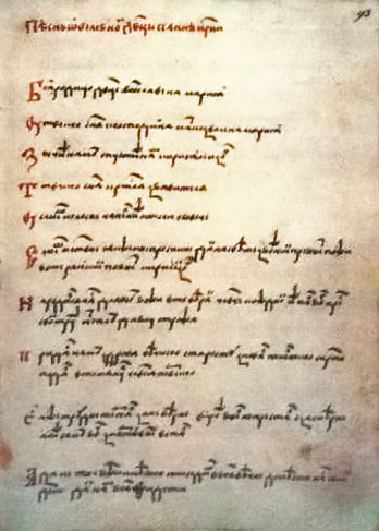 Беларуская (тарашкевіца): Статут Вялікага Княства Літоўскага (Statut Vialikaha Kniastva Litoŭskaha). Замойскі сьпіс